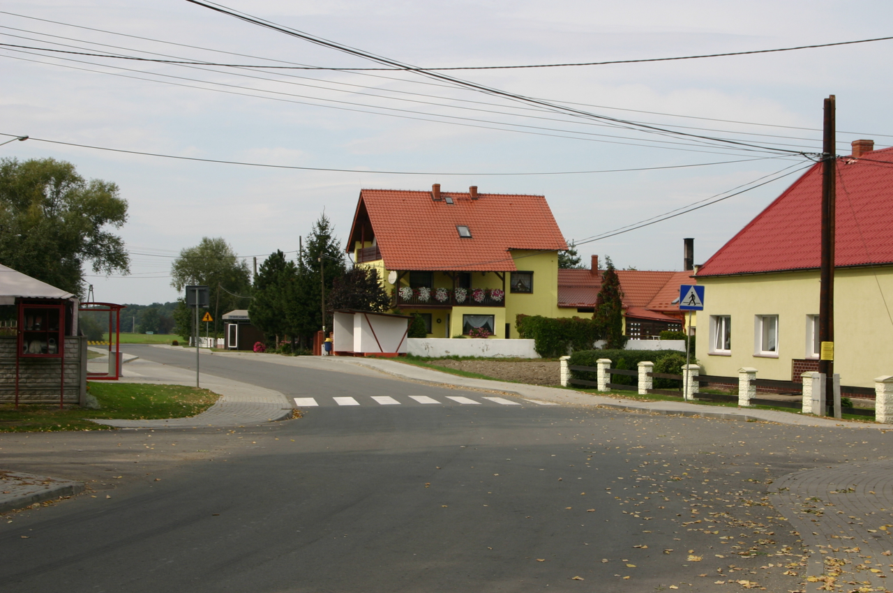 Zawada (dodatkowa nazwa w j. niem. Zowade) – wieś w Polsce położona w województwie opolskim, w powiecie prudnickim, w gminie Głogówek.